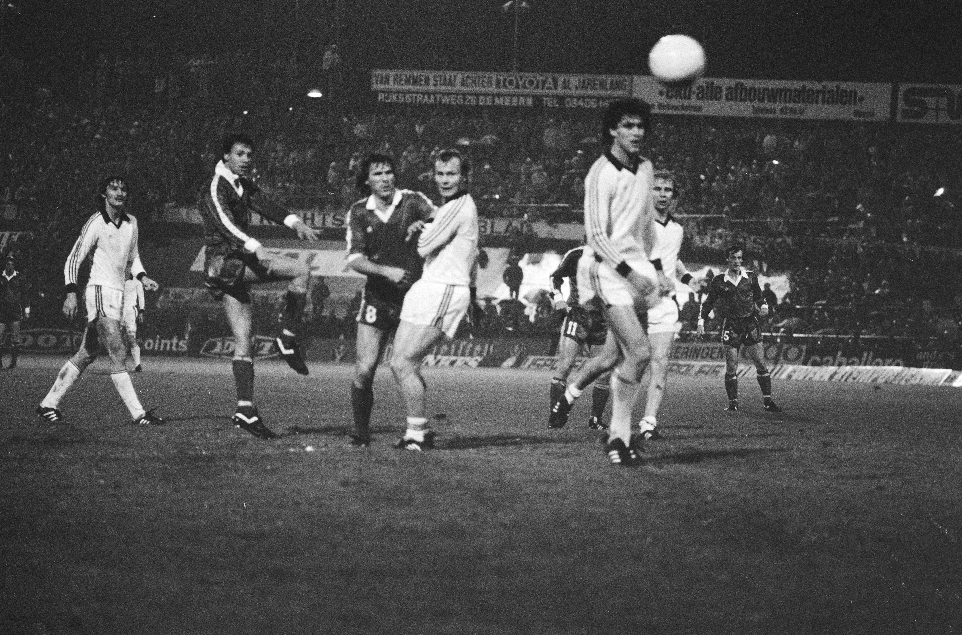 Collectie / Archief : Fotocollectie Anefo Reportage / Serie : [ onbekend ] Beschrijving : Europacup III FC Utrecht tegen Eintracht Frankfurt 2-1 Datum : 22 oktober 1980 Trefwoorden : sport, voetbal Instellingsnaam : FC Utrecht Fotograaf : Antonisse, Marcel / Anefo Auteursrechthebbende : Nationaal Archief Materiaalsoort : Negatief (zwart/wit) Nummer archiefinventaris : bekijk toegang 2.24.01.05 Bestanddeelnummer : 931-1009